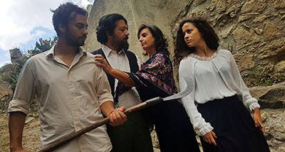 La Lupa